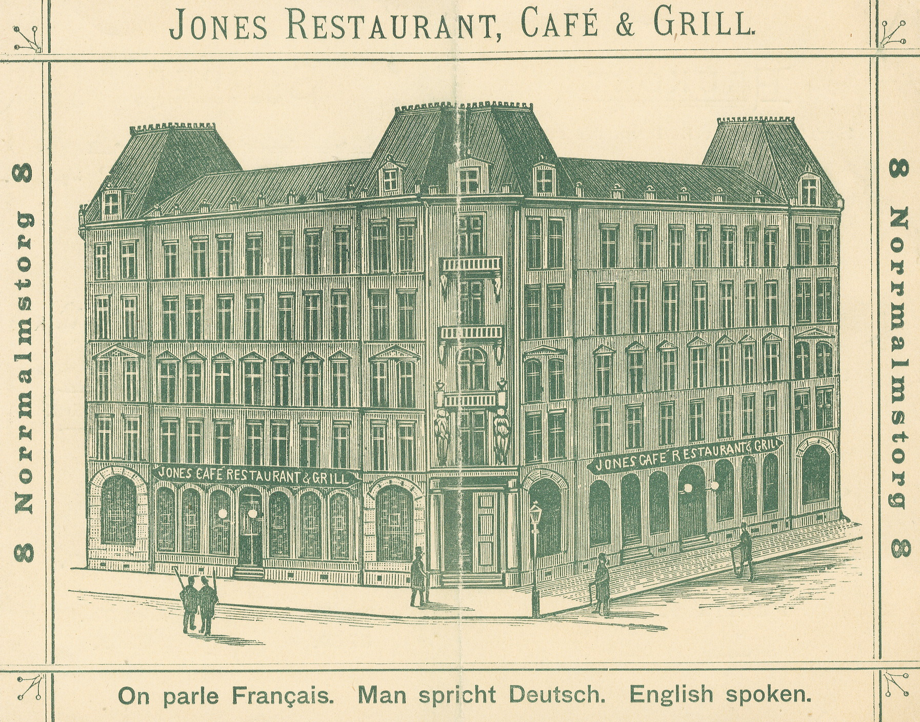 Jones Restaurang och grill, Norrmalmstorg 2 / Hamngatan 6